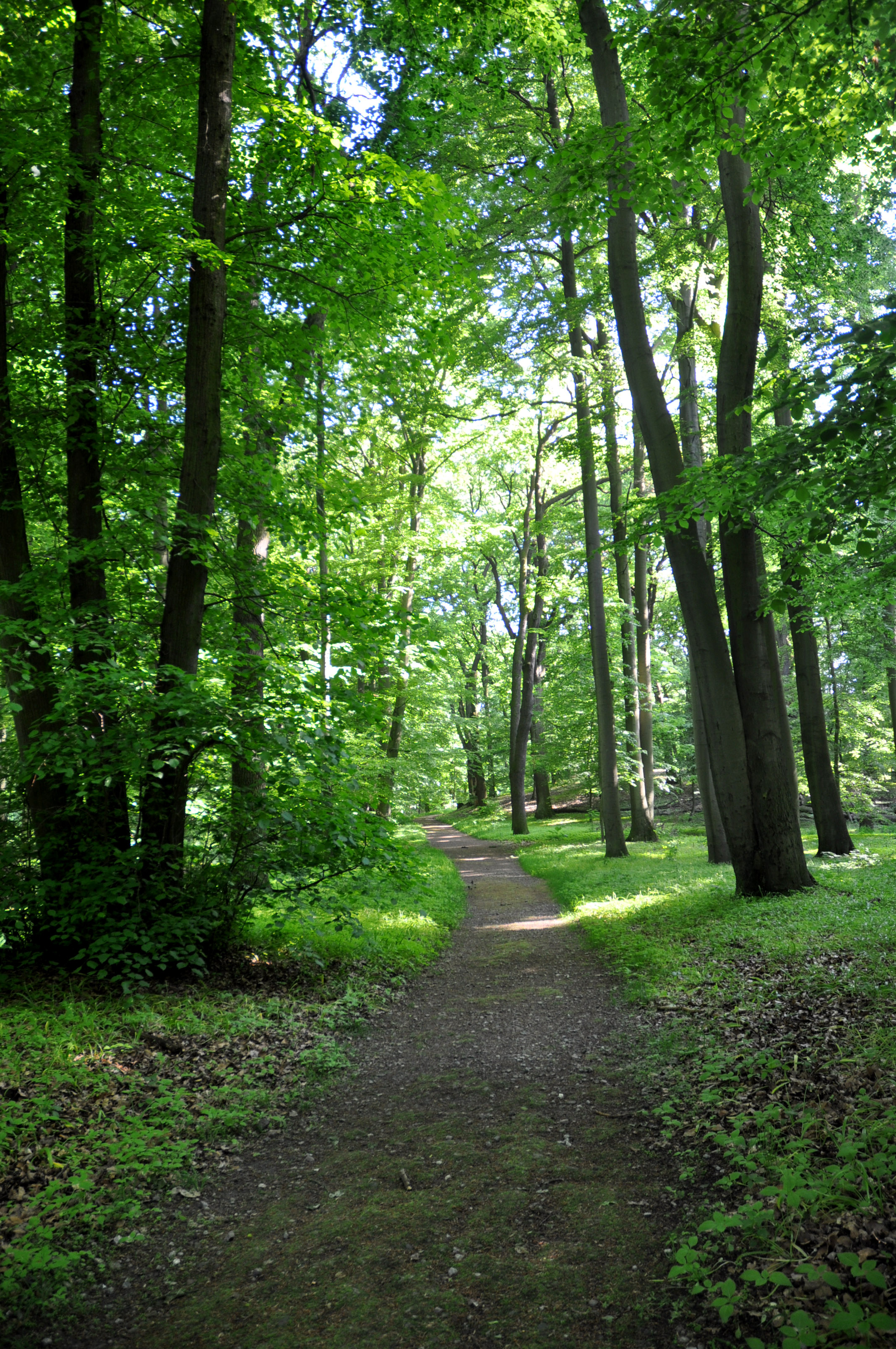 Mittlerer Drive an der Römischen Bank, verwaldeter Park